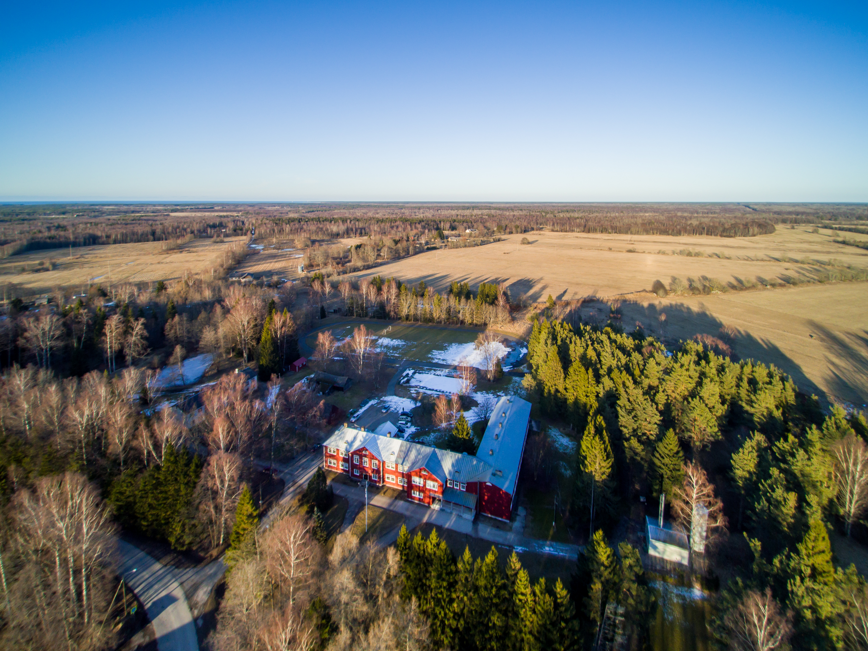 Lauka kool